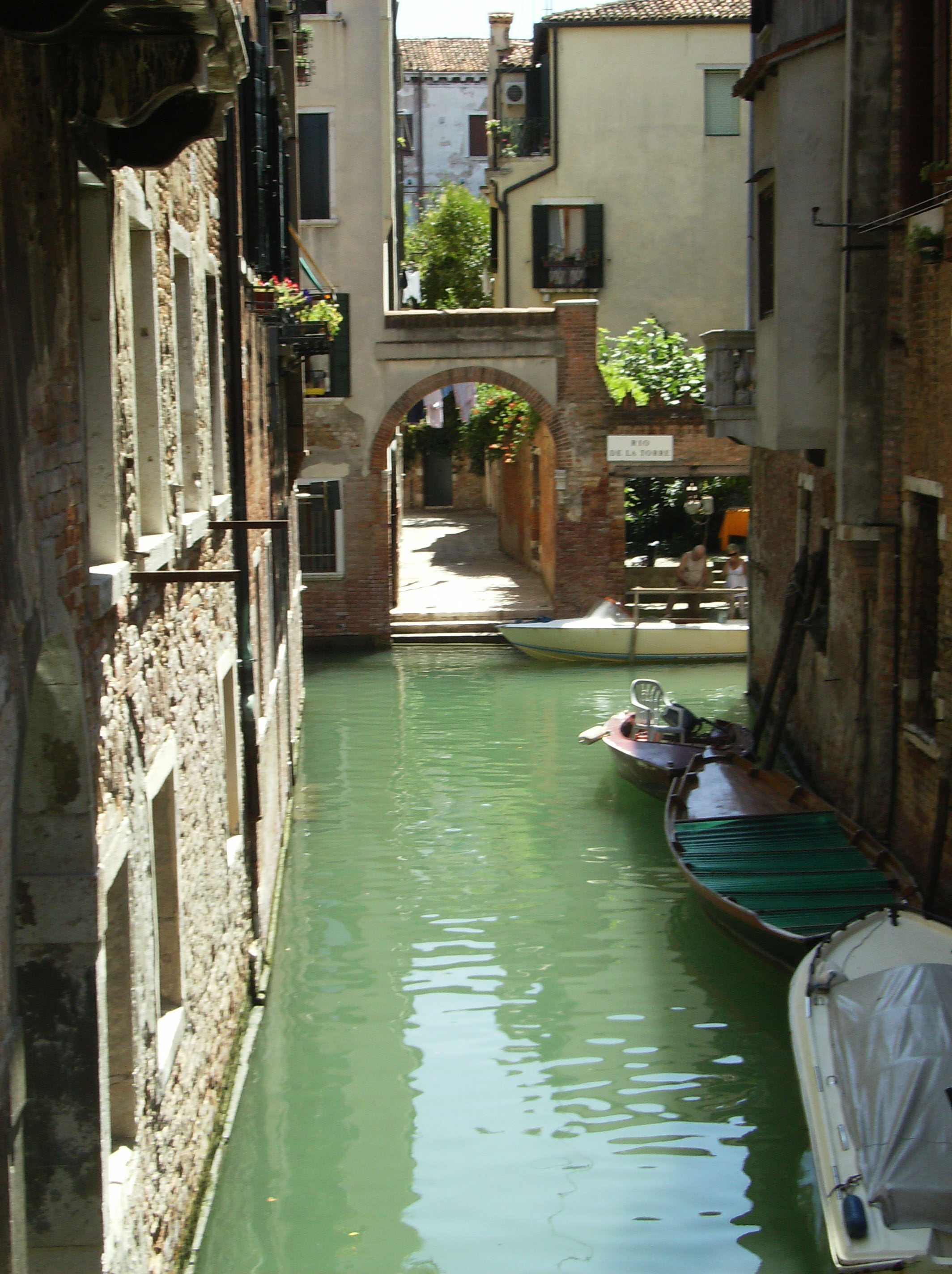 rio di san Boldo extrémité est, au fond rio dei torri - Venise